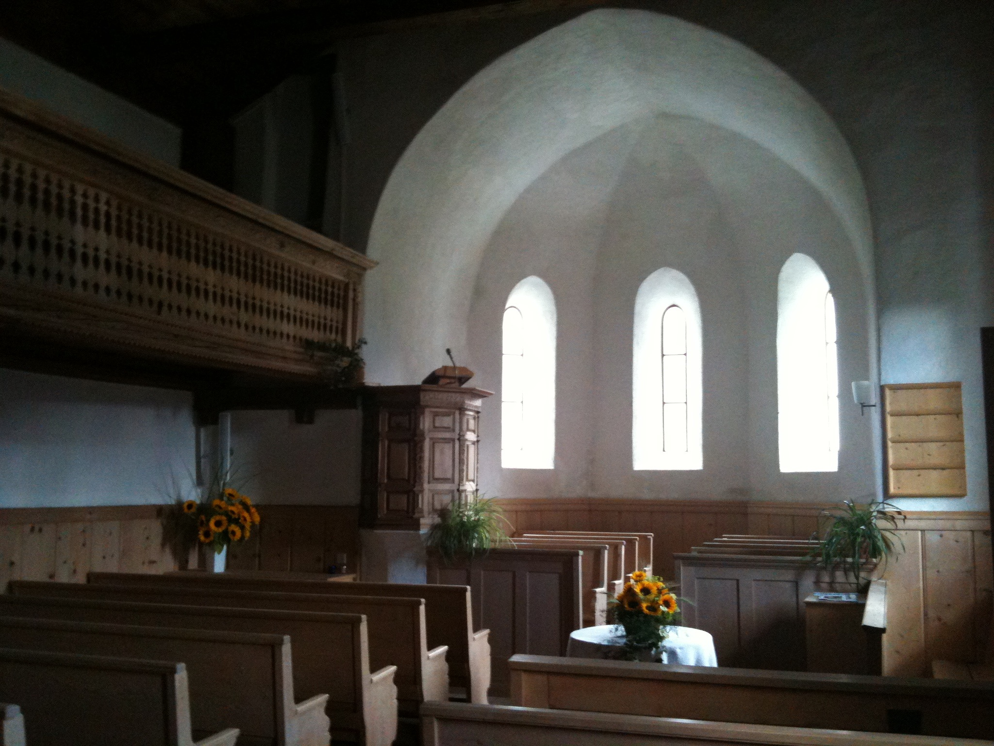 reformierte Kirche Davos Frauenkirch, Kanton Graubünden